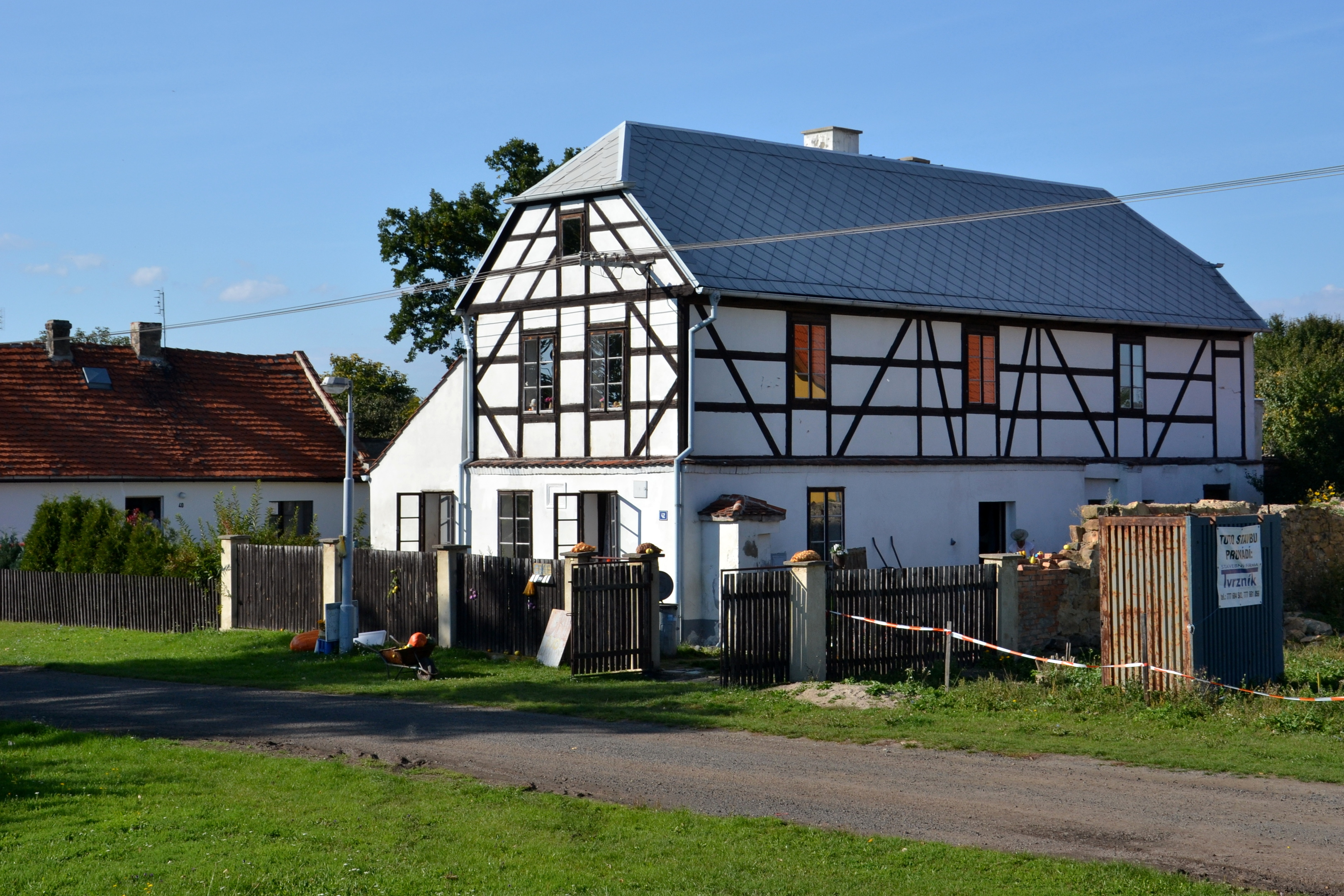 Venkovská usedlost (Široké Třebčice), Široké Třebčice 42